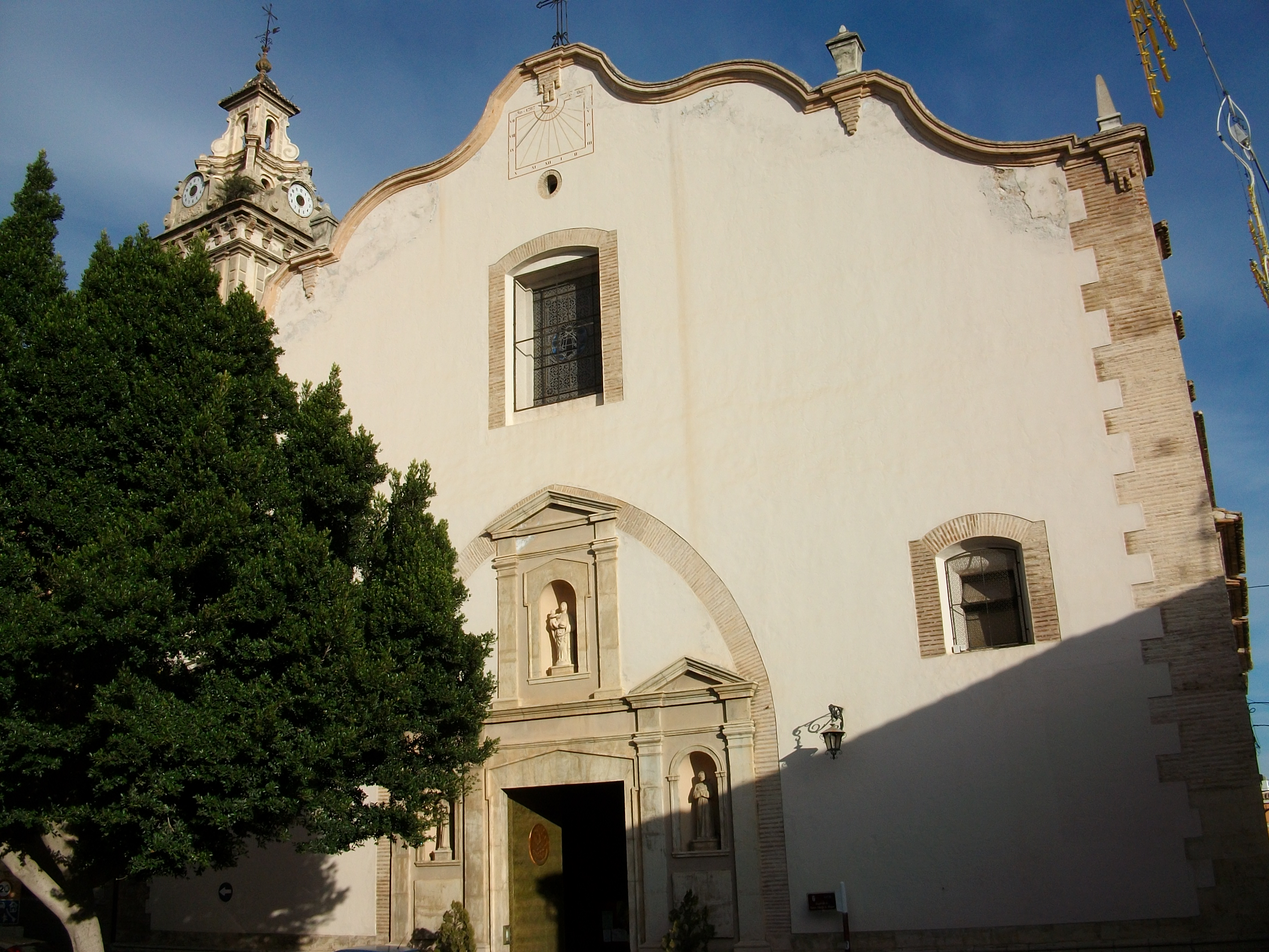 Església de Santa Maria la Major d'Oliva, la Safor, País Valencià.